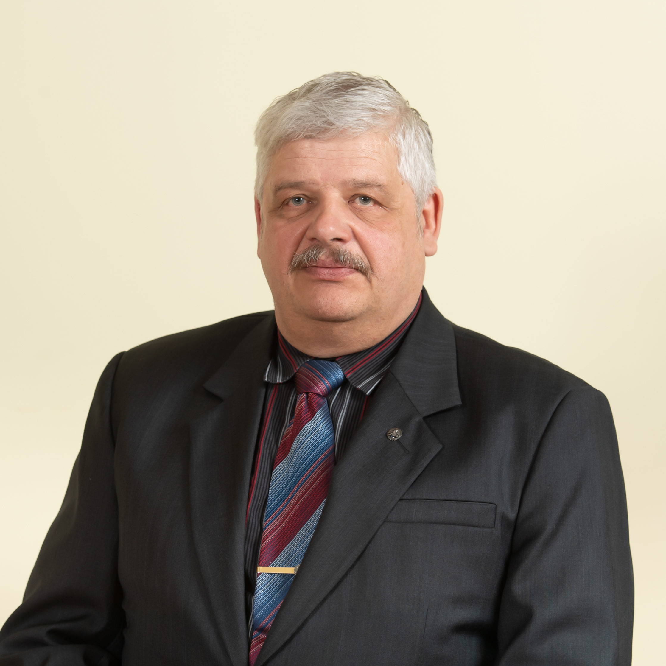 Riho Breivel